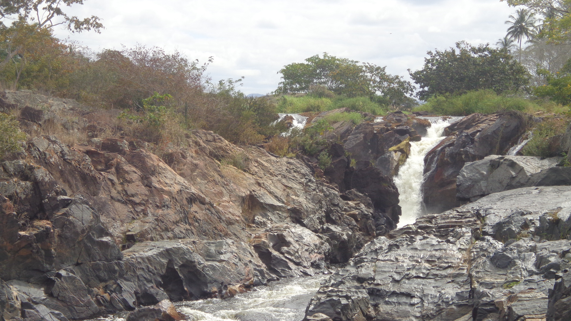 Divisa do Rio pardo entre a aldeia e a região de palmares sul da Bahia